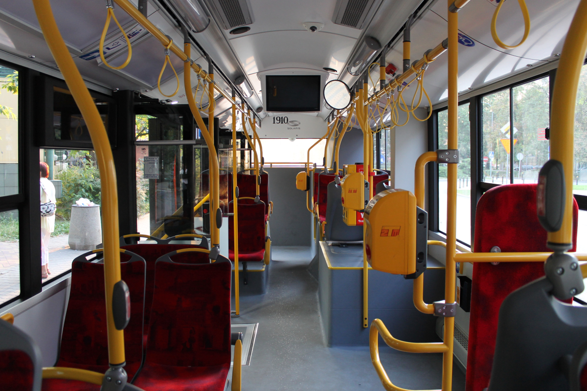 Wnętrze warszawskiego autobusu elektrycznego Solaris Urbino 12 electric.